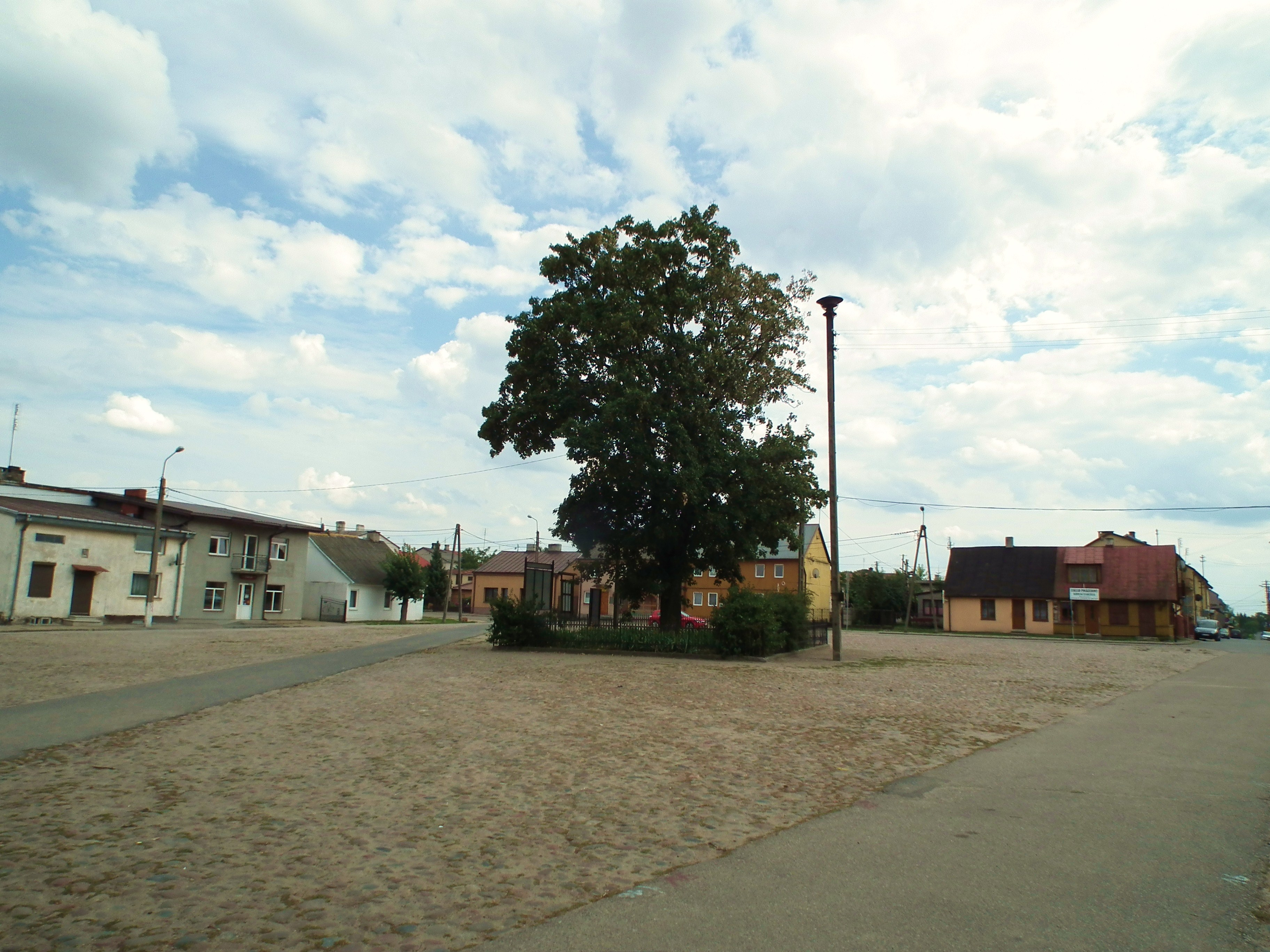 Pejzaż miejski z Bodzanowa.